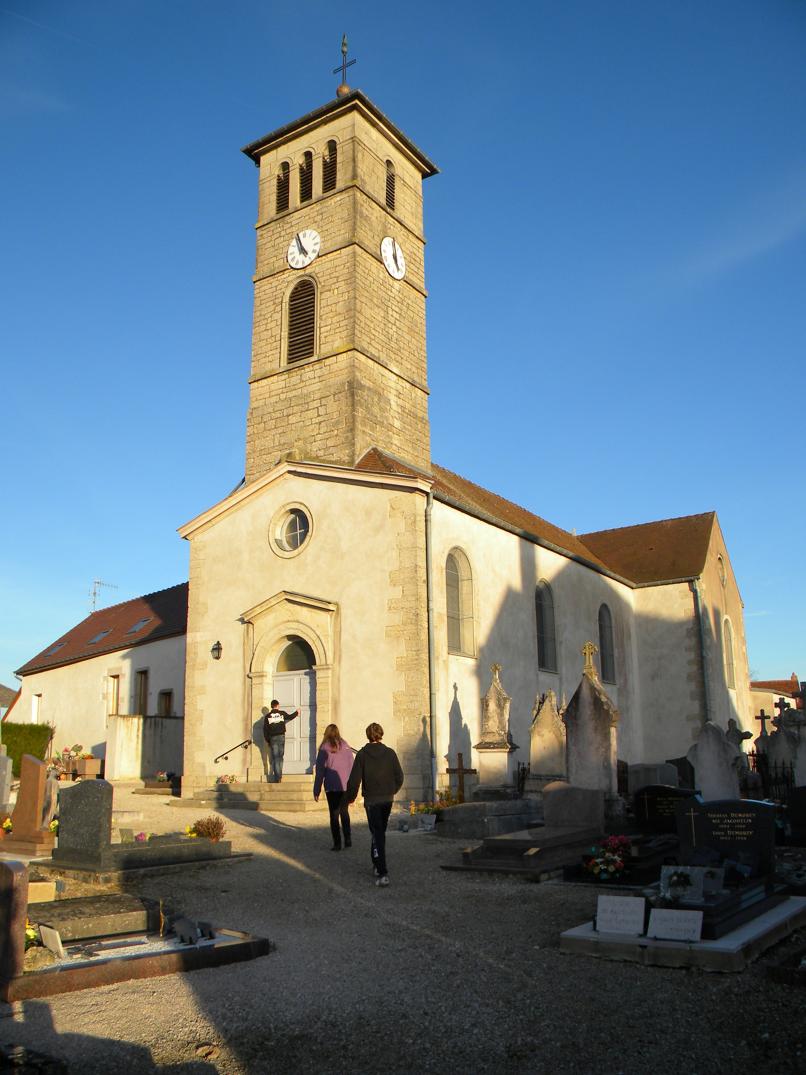 Eglise de Chaux